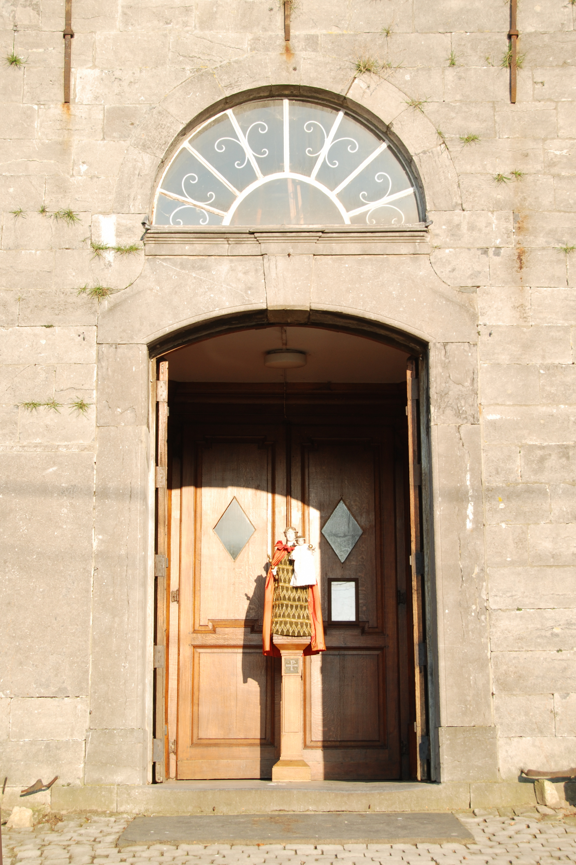 Belgique - Brabant wallon - Court-Saint-Étienne - Église Saint-Étienne